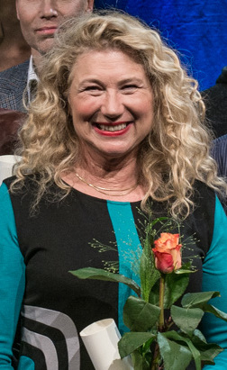 De nominerade för Augustpriset 2016 i de olika priskategorierna presenteras den 24 oktober 2016 på Kulturhuset Stadsteatern i Stockholm.